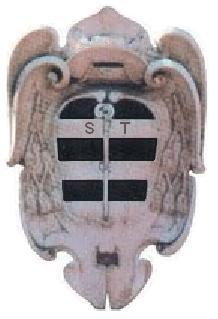 Stemma Abbazia territoriale SS. Trinità di Cava